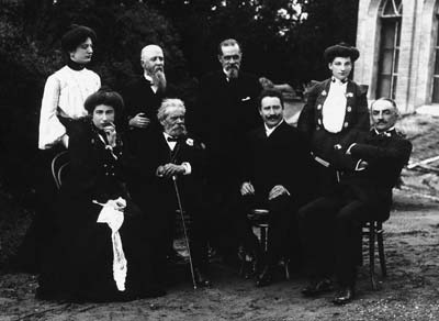 Alcuni componenti del circolo culturale della contessa. Si possono notare Giosuè Carducci (il 2° seduto da sinistra) ed il tenore lirico Alessandro Bonci (il 3° seduto da sinistra) Foto di